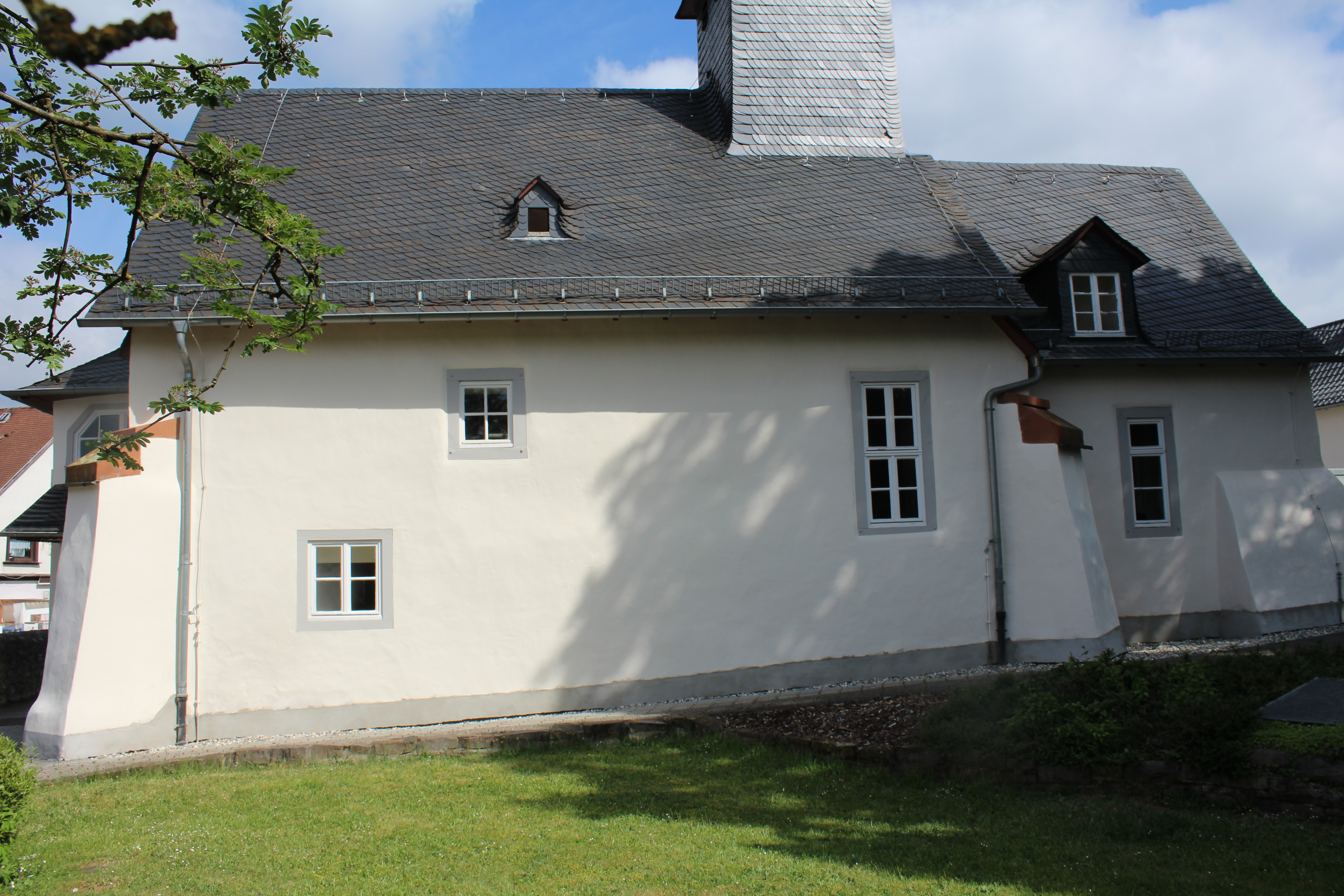 Ev. Kirche Laufdorf, Wetzlar, Lahn-Dill-Kreis, Hessen, Deutschland